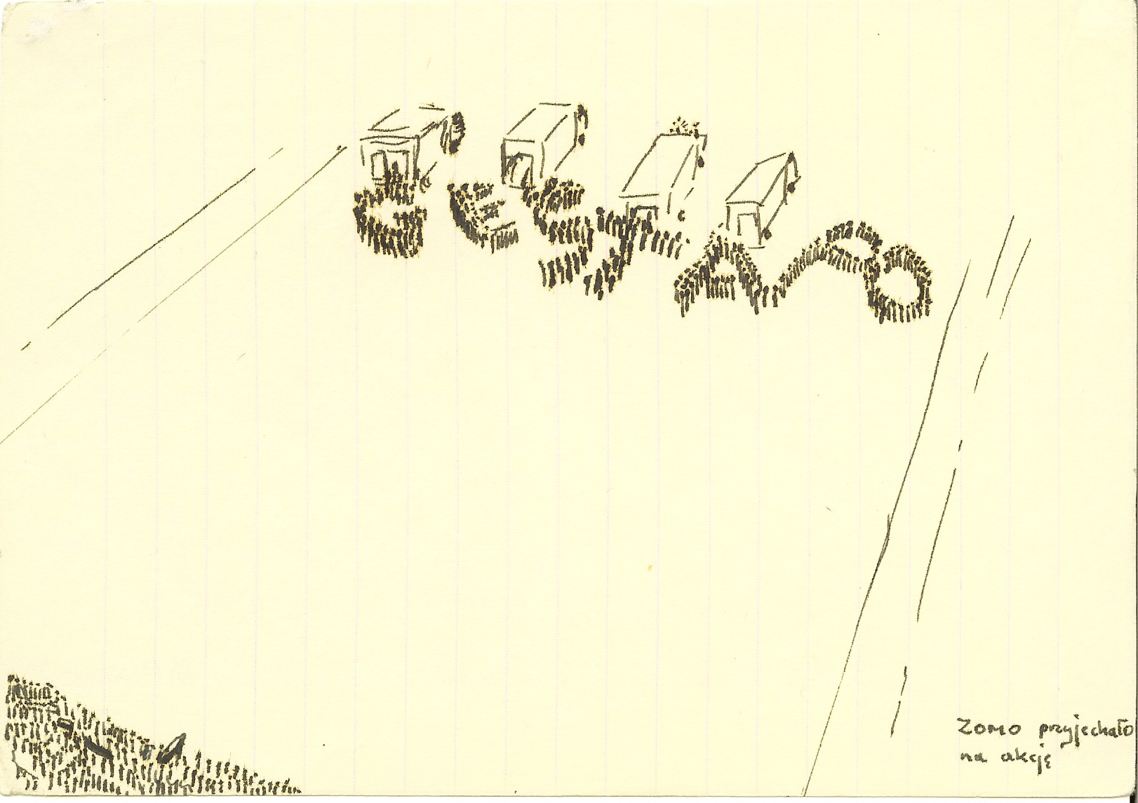 ZOMO przyjechało na akcję - rysunek z czasów stanu wojennego, aut. Maciej Miezian